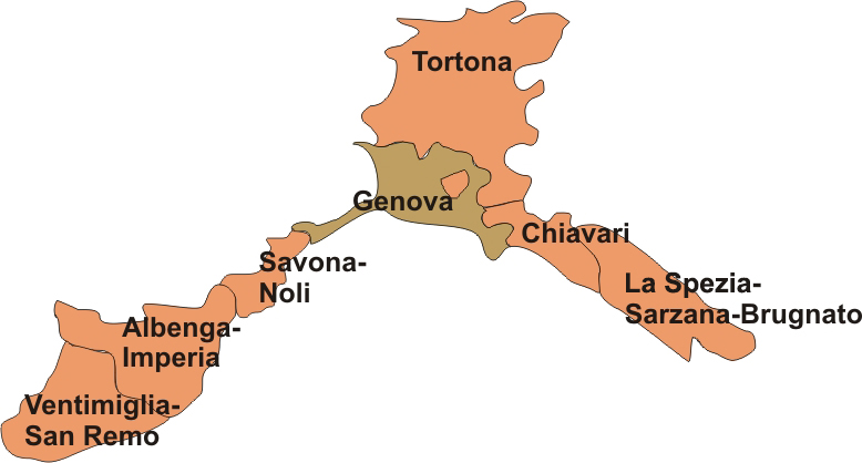 Mapa de la Regió Eclesiàstica Ligúria